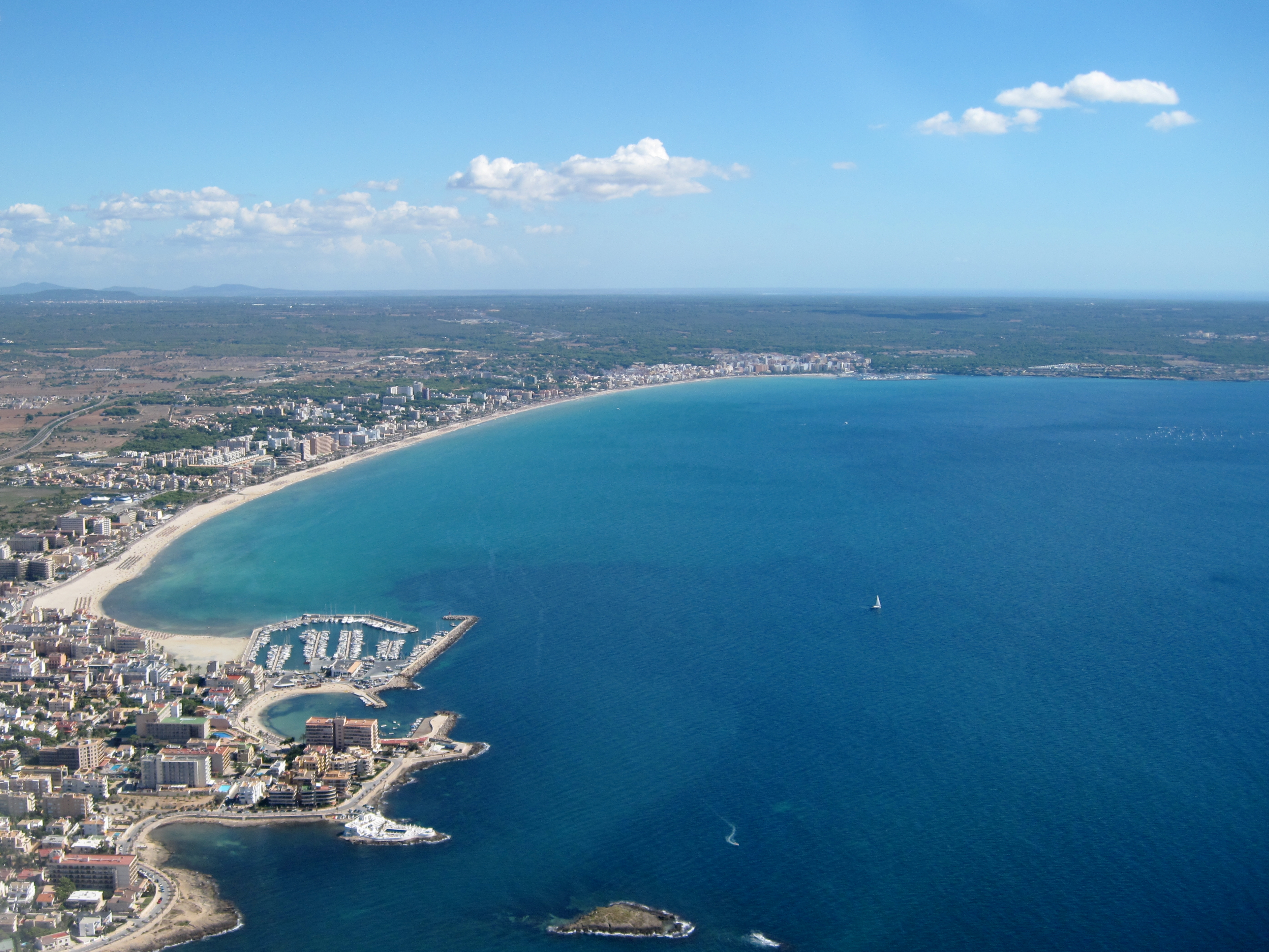 Luftbild der Platja de Palma zwischen Can Pastilla und S’Arenal, Mallorca, Spanien